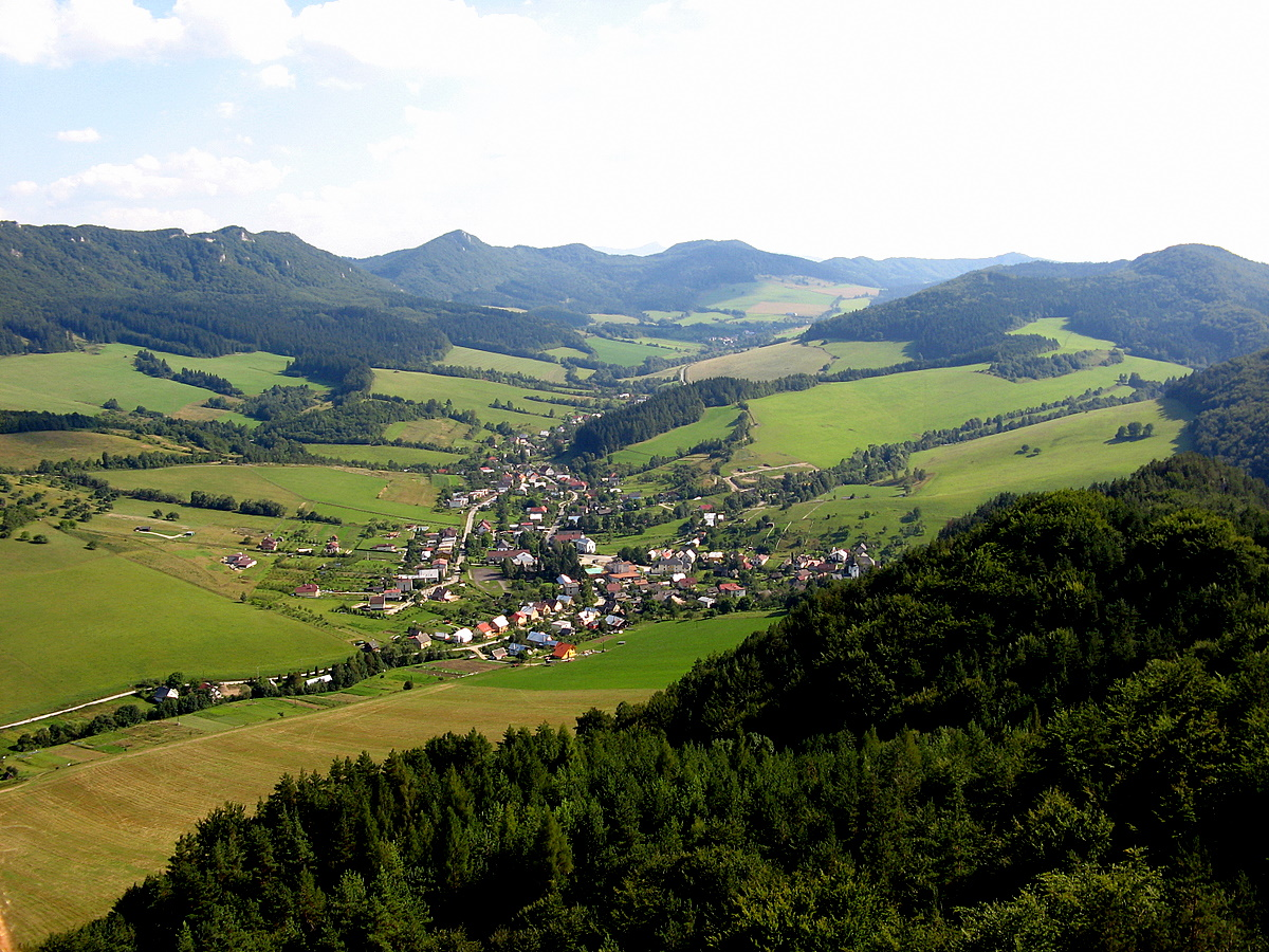 Súľovské skaly